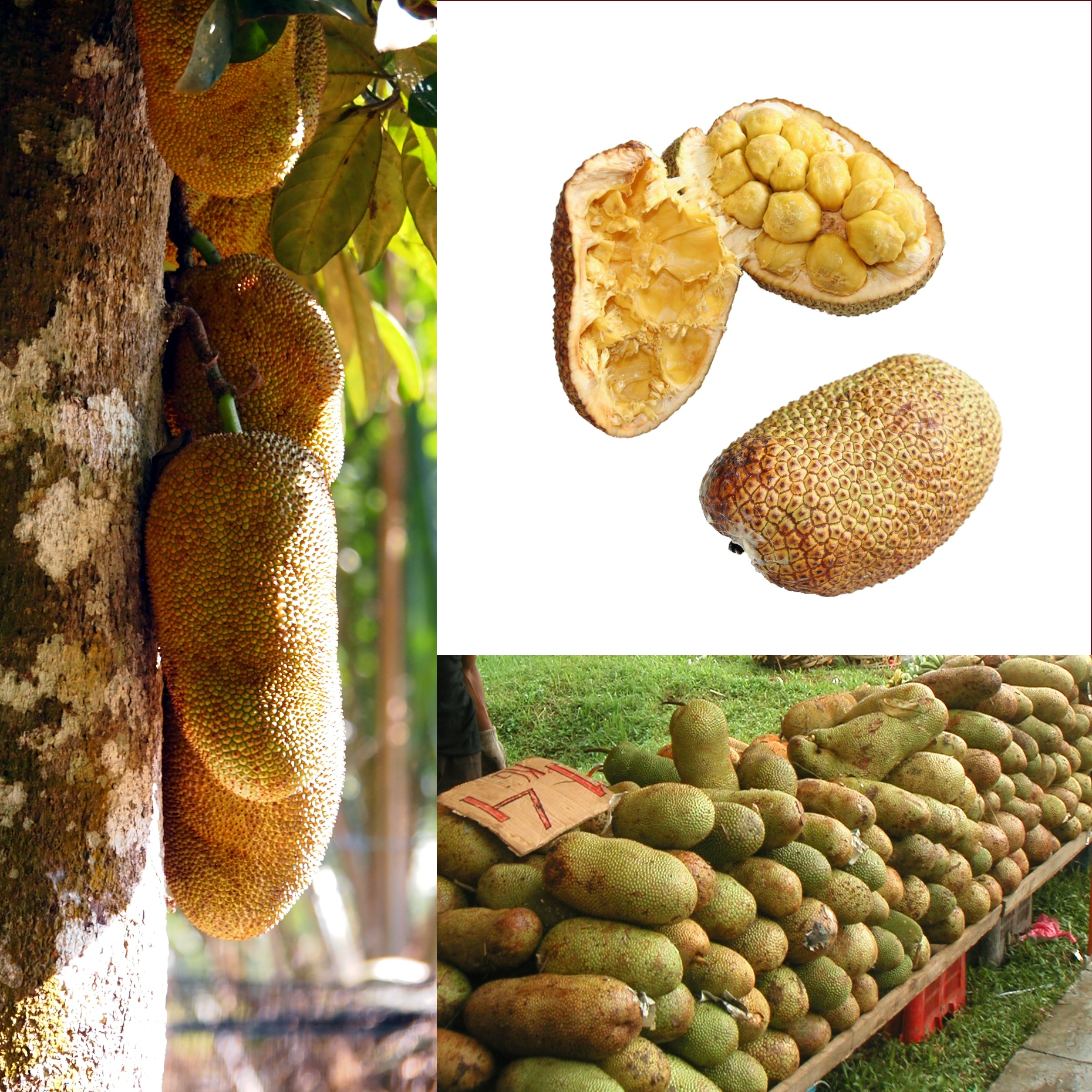 Chempedak (chlebowiec chempedak Artocarpus integer). Ilustracja podręcznika Owoce.